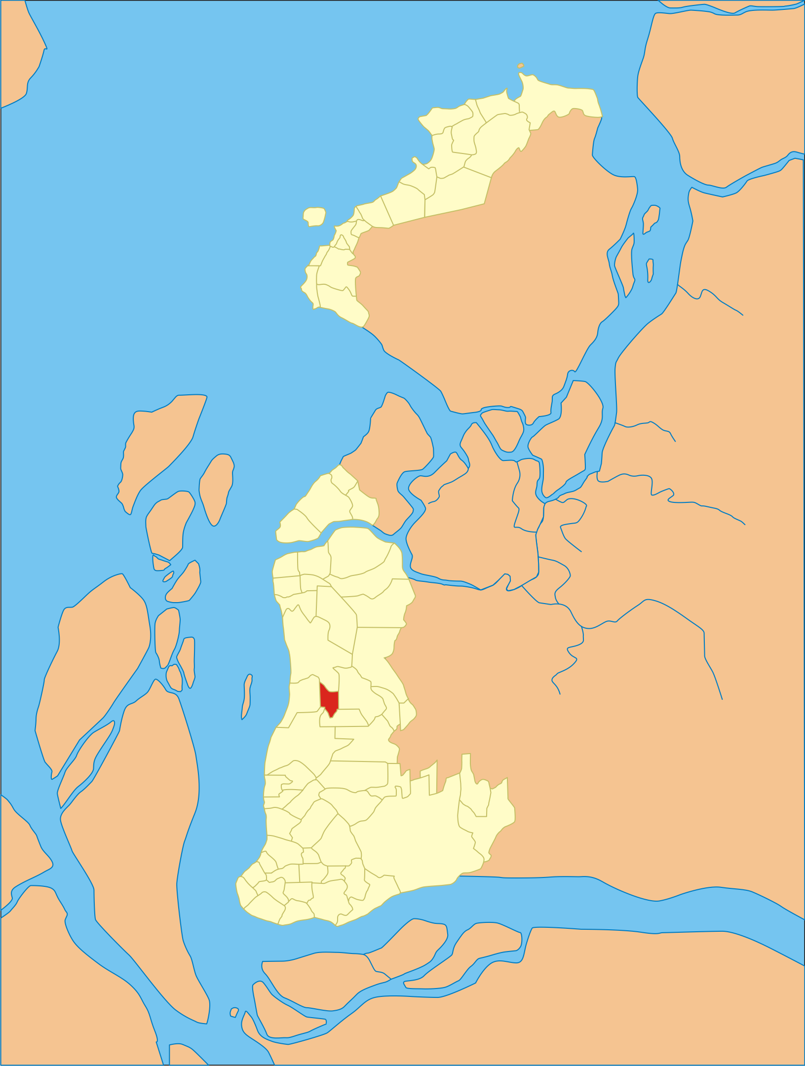 Localização do bairro em Belém do Pará